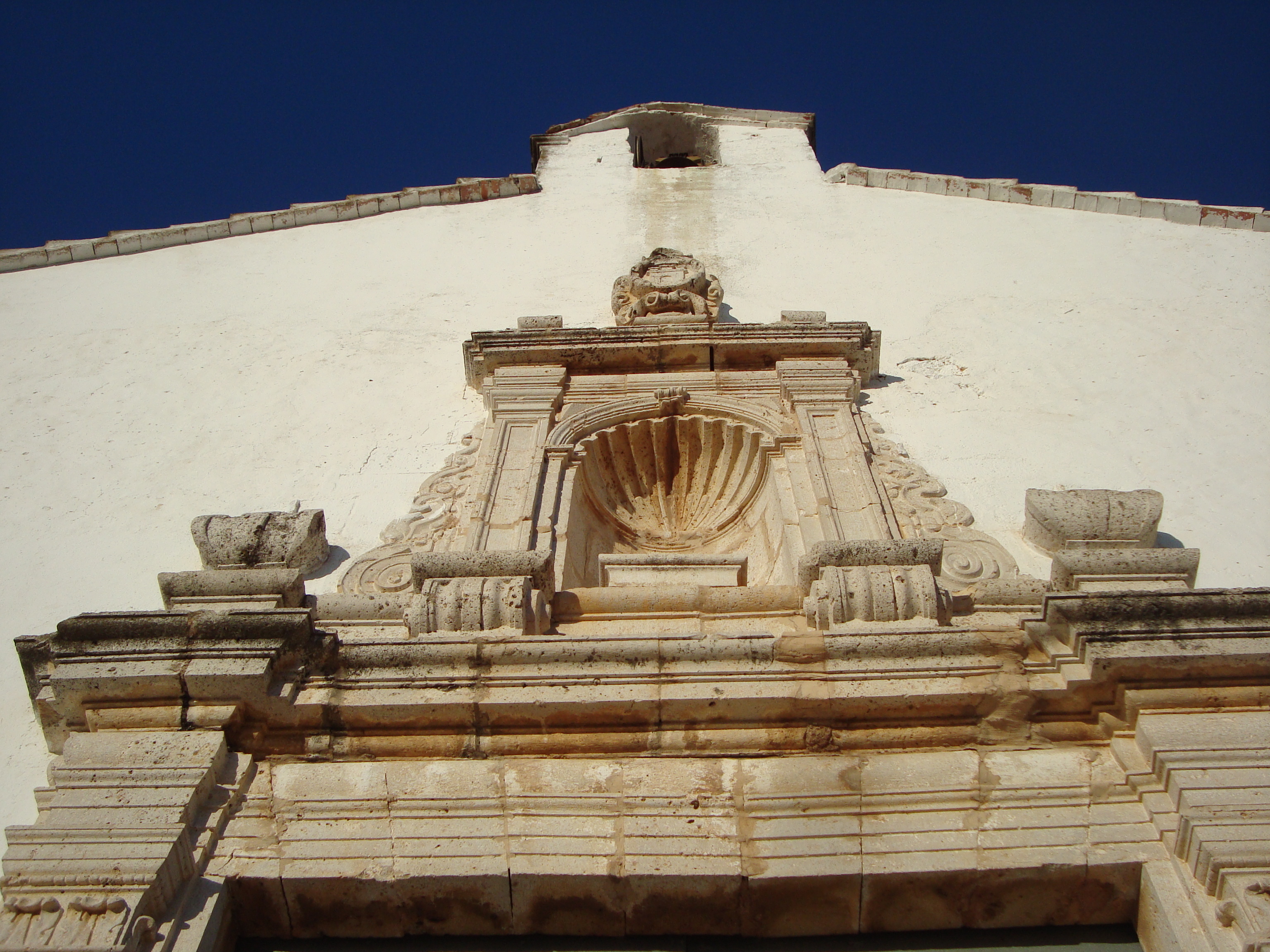 Fachada de la ermita de Santa Lucía y San Benito, Alcalà de Xivert